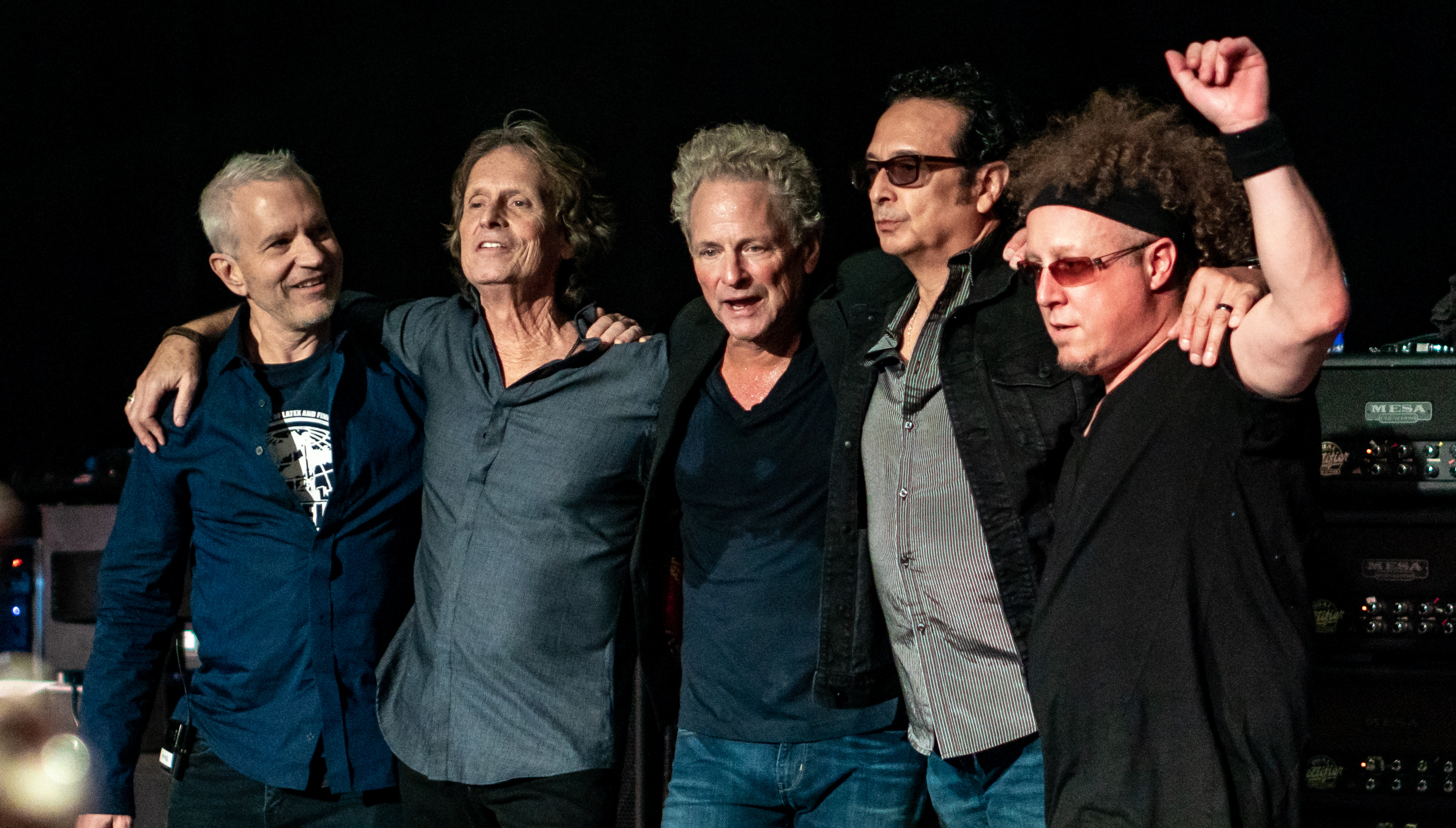 LindsBuckPort071018-69